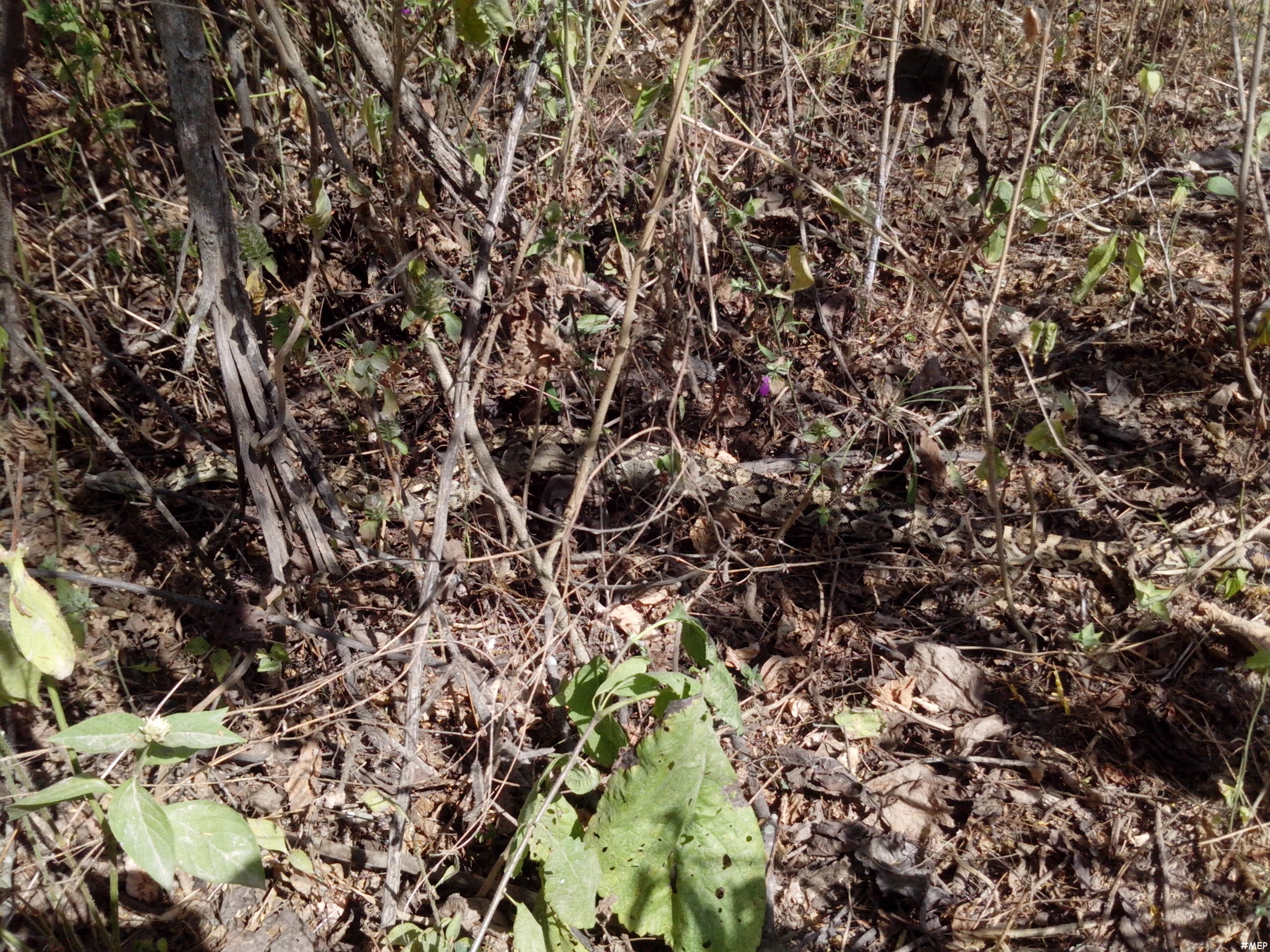 Boa del bosque seco ecuatorial tumbesino.